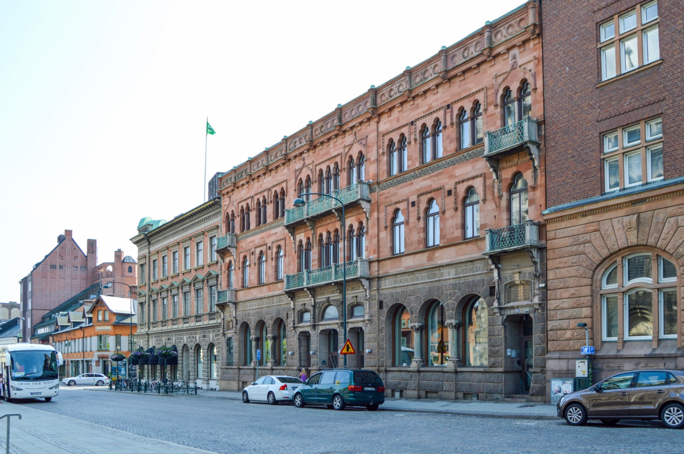 Kyrkogatan 9 i Lund (i bildens mitt)